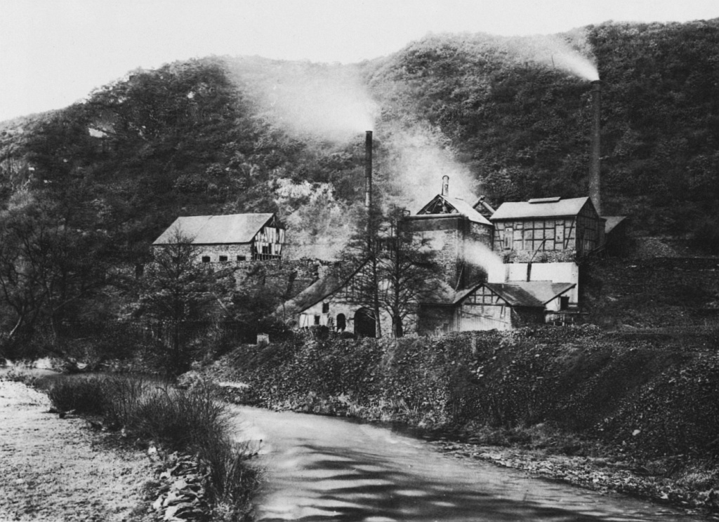 Die Grünebacher Hütte in Grünebach / Rheinland-Pfalz um 1913.